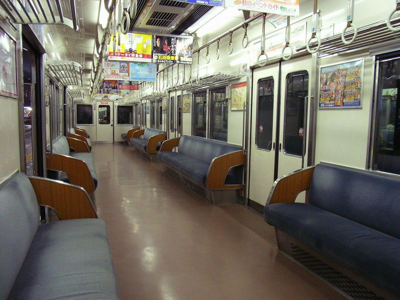 関西空港駅停車中のja:南海9000系電車の車内.